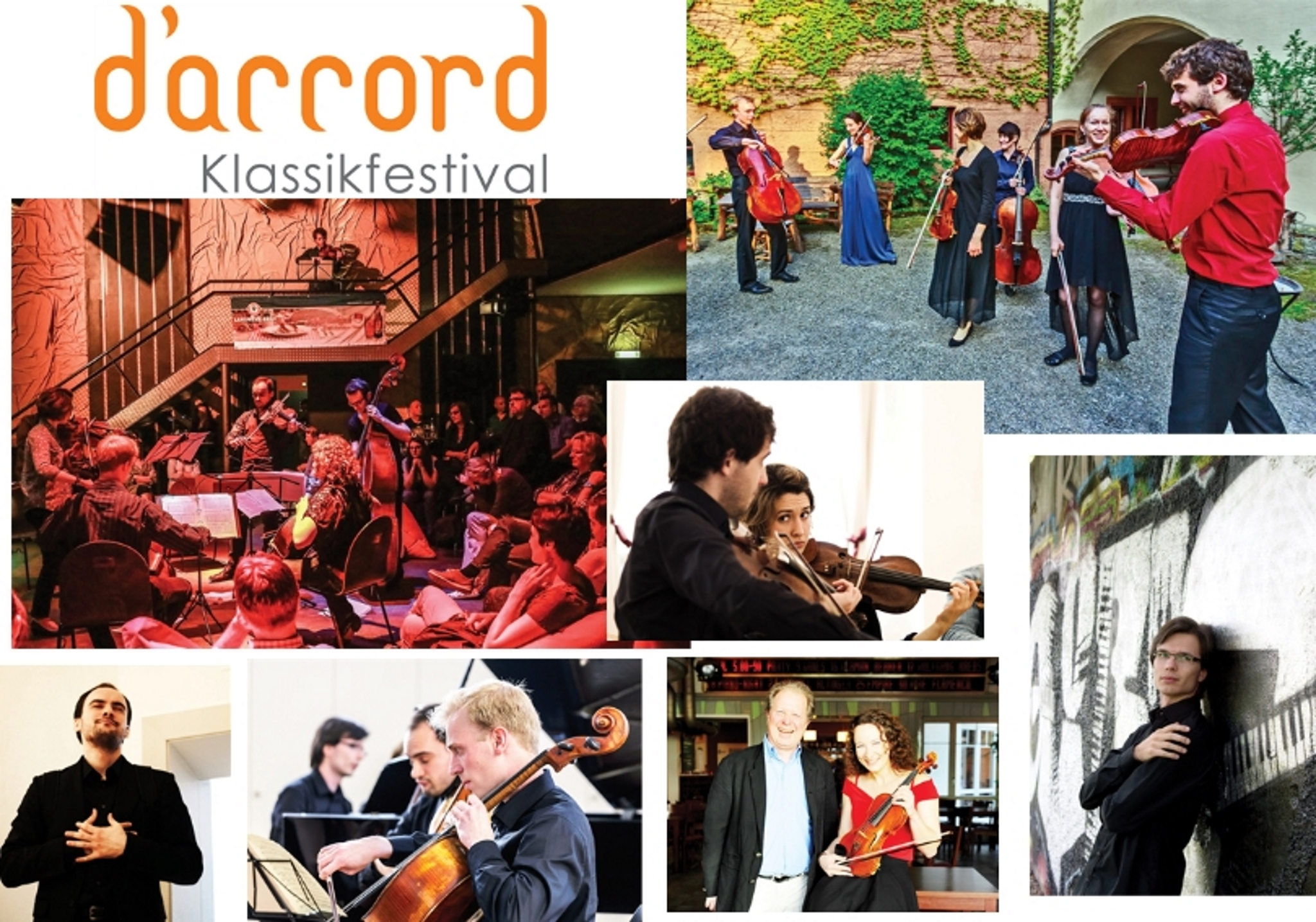 D`Accord, das Klassikfestival 2015